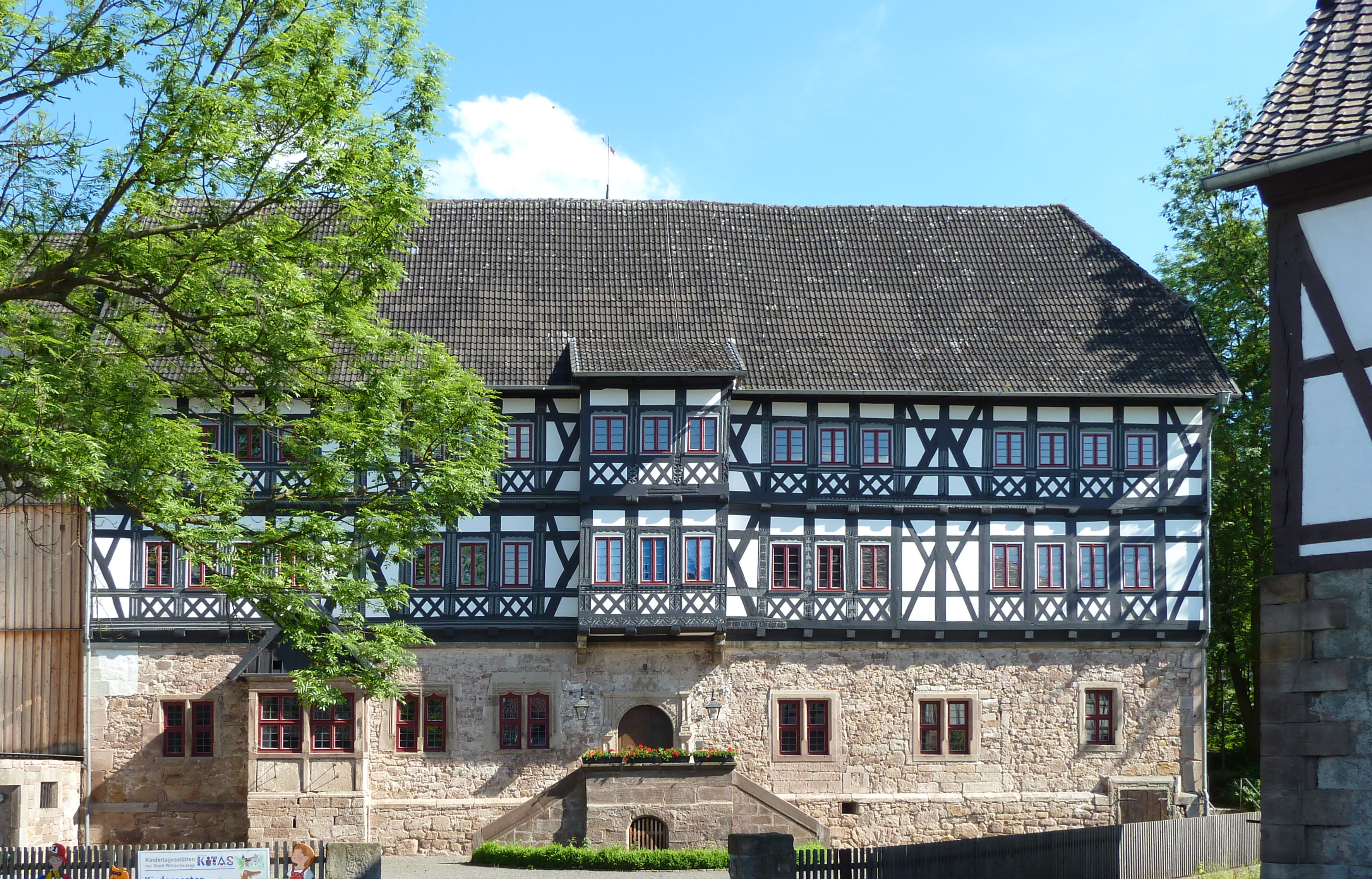 Schloss in Witzenhausen-Ermschwerd, Werra-Meißner-Kreis, Nordhessen. Erbaut 1616, Fachwerk mit Sandsteinsockelgeschoss